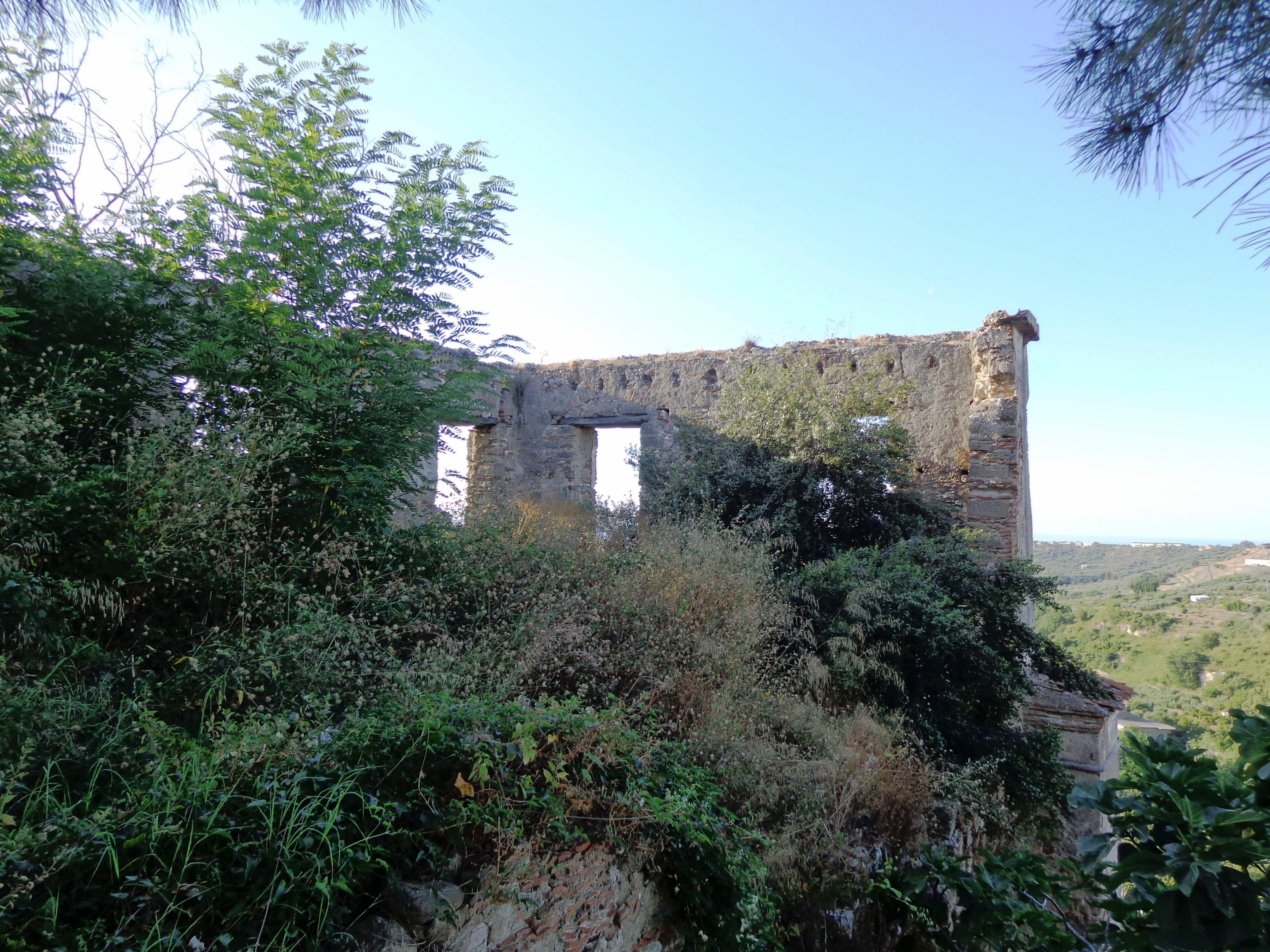 Condrò ruderi Monastero